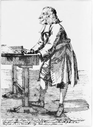 Caricatuta del compositor Tommaso Bernardo Gaffi, por Pier Leone Ghezzi